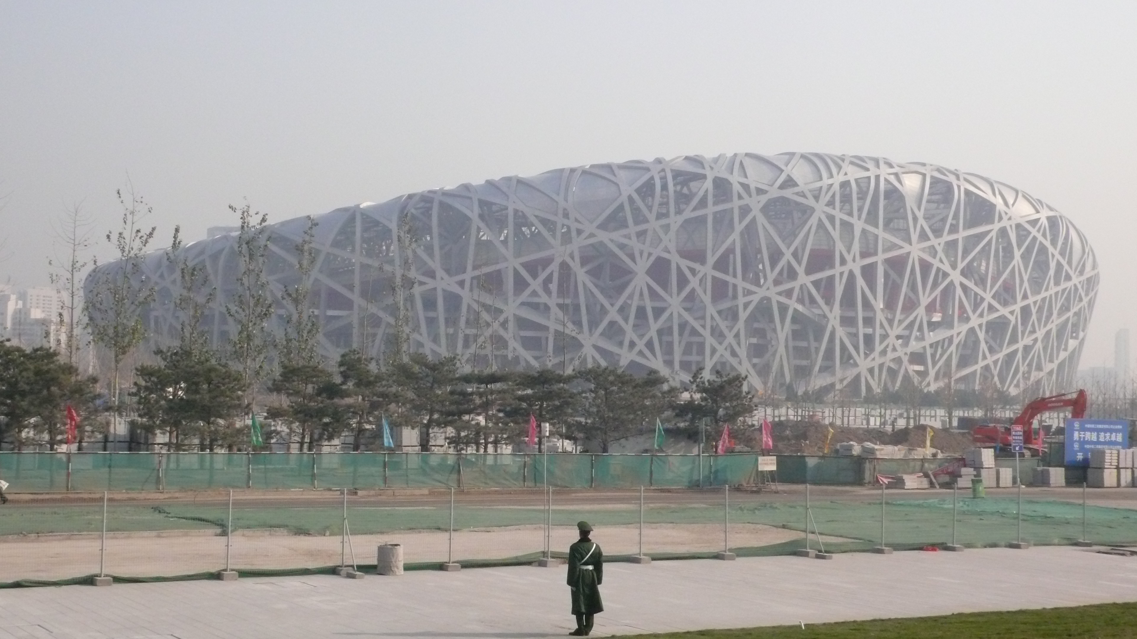 中文（中国大陆）: 鸟巢外景